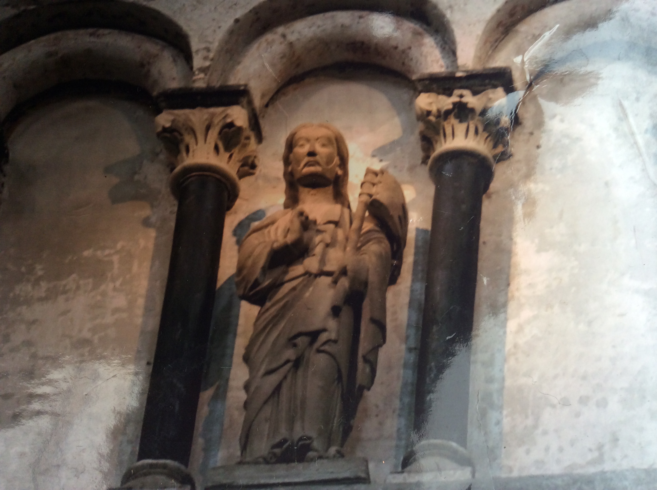 Christusstatue aus dem 12. Jahrhundert